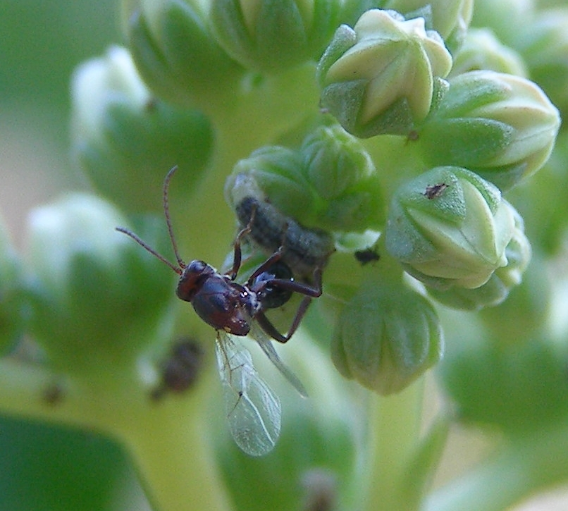 Callaspidia sp, femelle pondant dans une larve de Syrphidae.